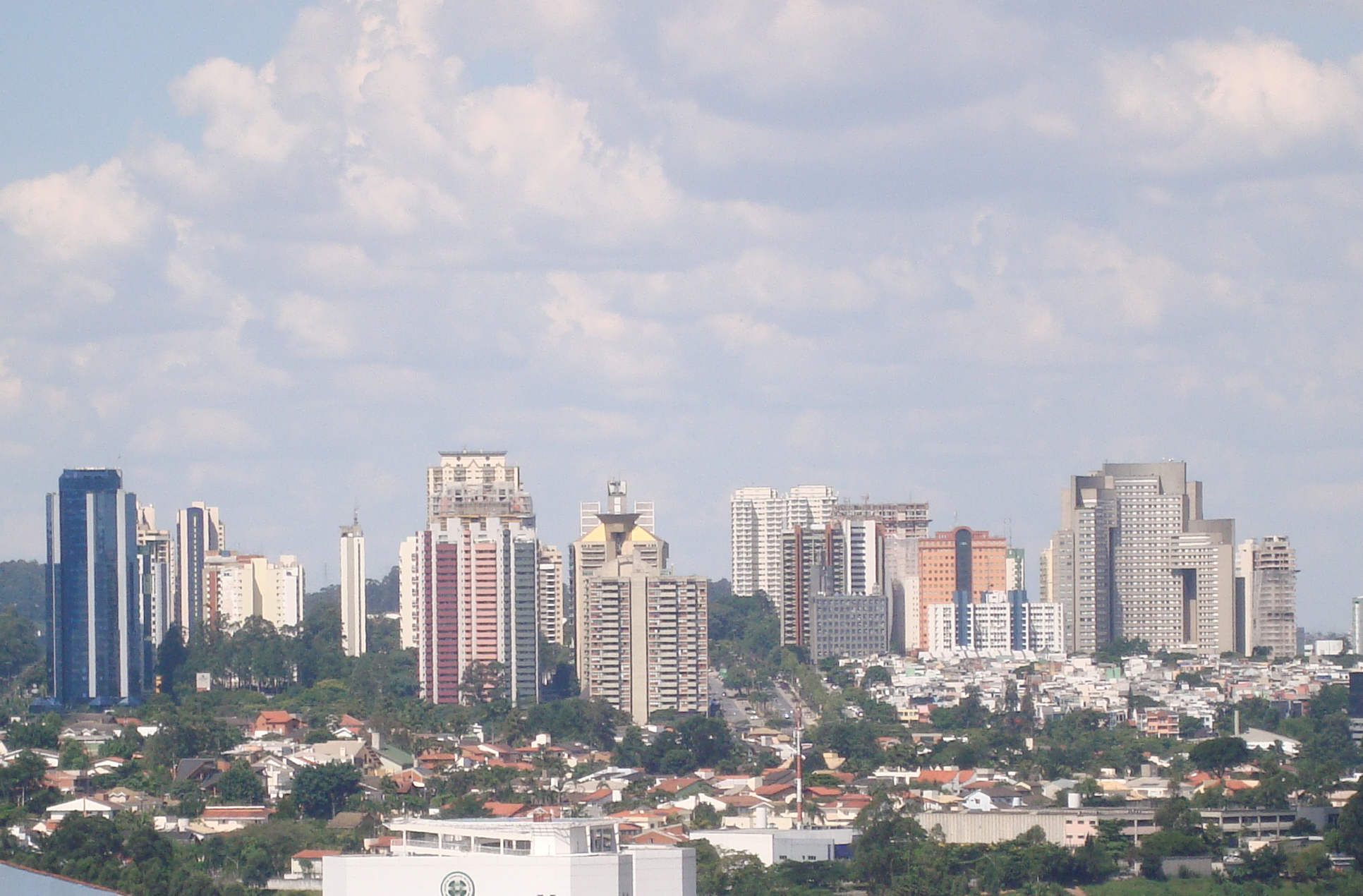 Centro comercial de Alphaville visto do Jardim Reginalice em Barueri